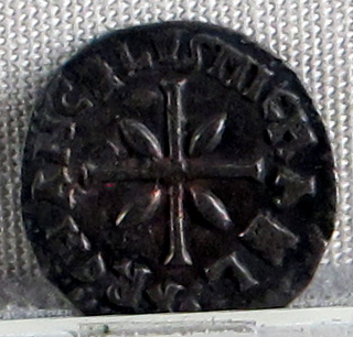 Palazzo Massimo alle Terme